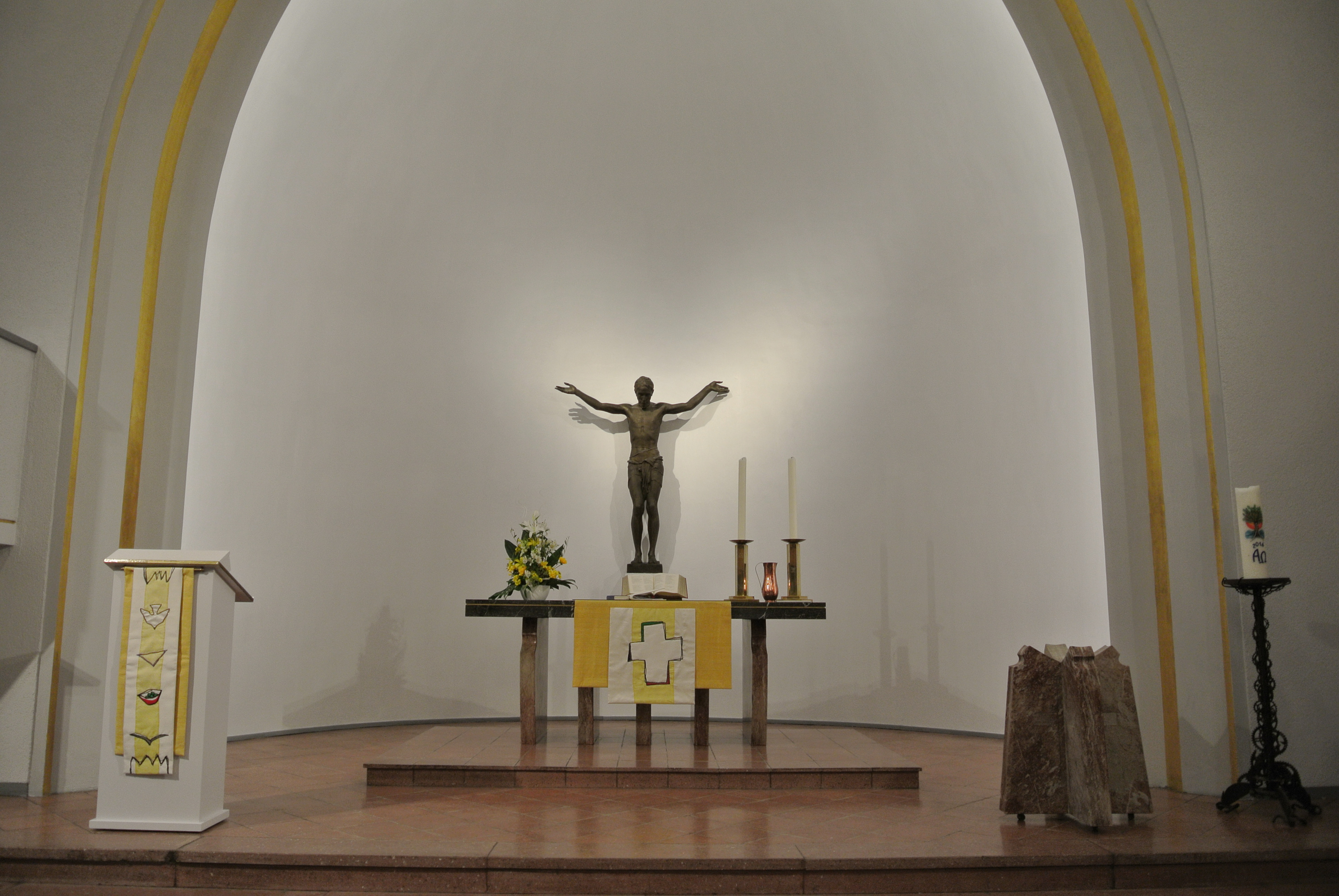 Friedenskirche in Frankfurt am Main-Gallus, Altar